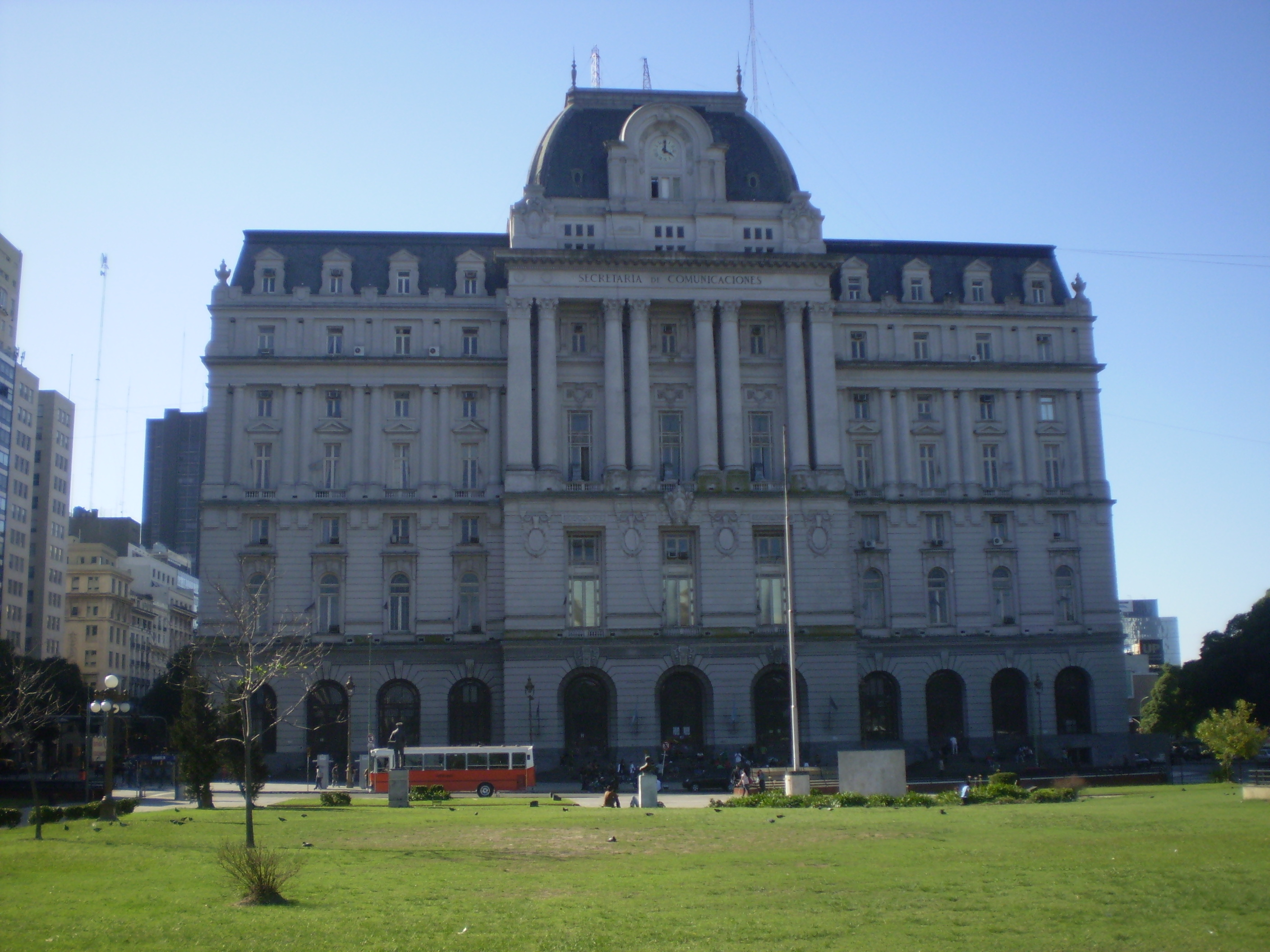 Fachada sur del edificio de la Secretaría de Comunicaciones, Buenos Aires, Argentina